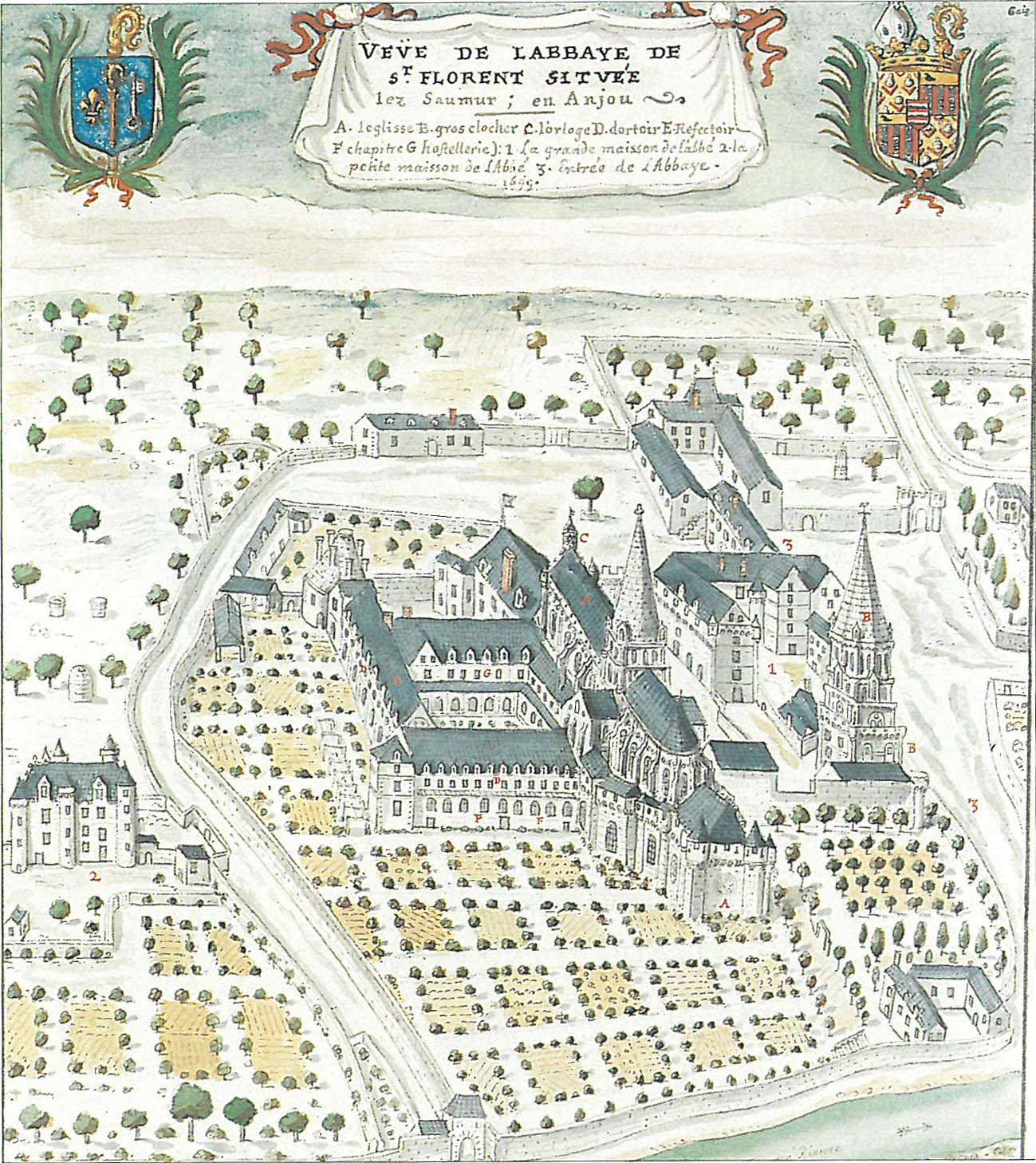 Croquis d'une vue sur l'abbaye Saint-Florent de Saumur en 1699.